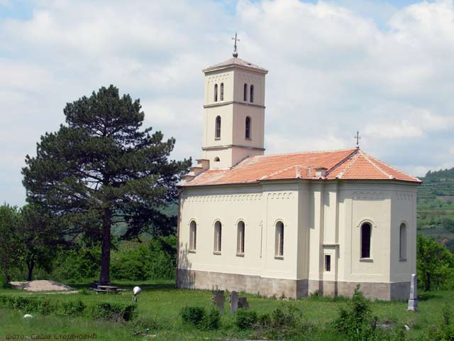 Црква св.Илије у селу Врело, надомак Сокобање